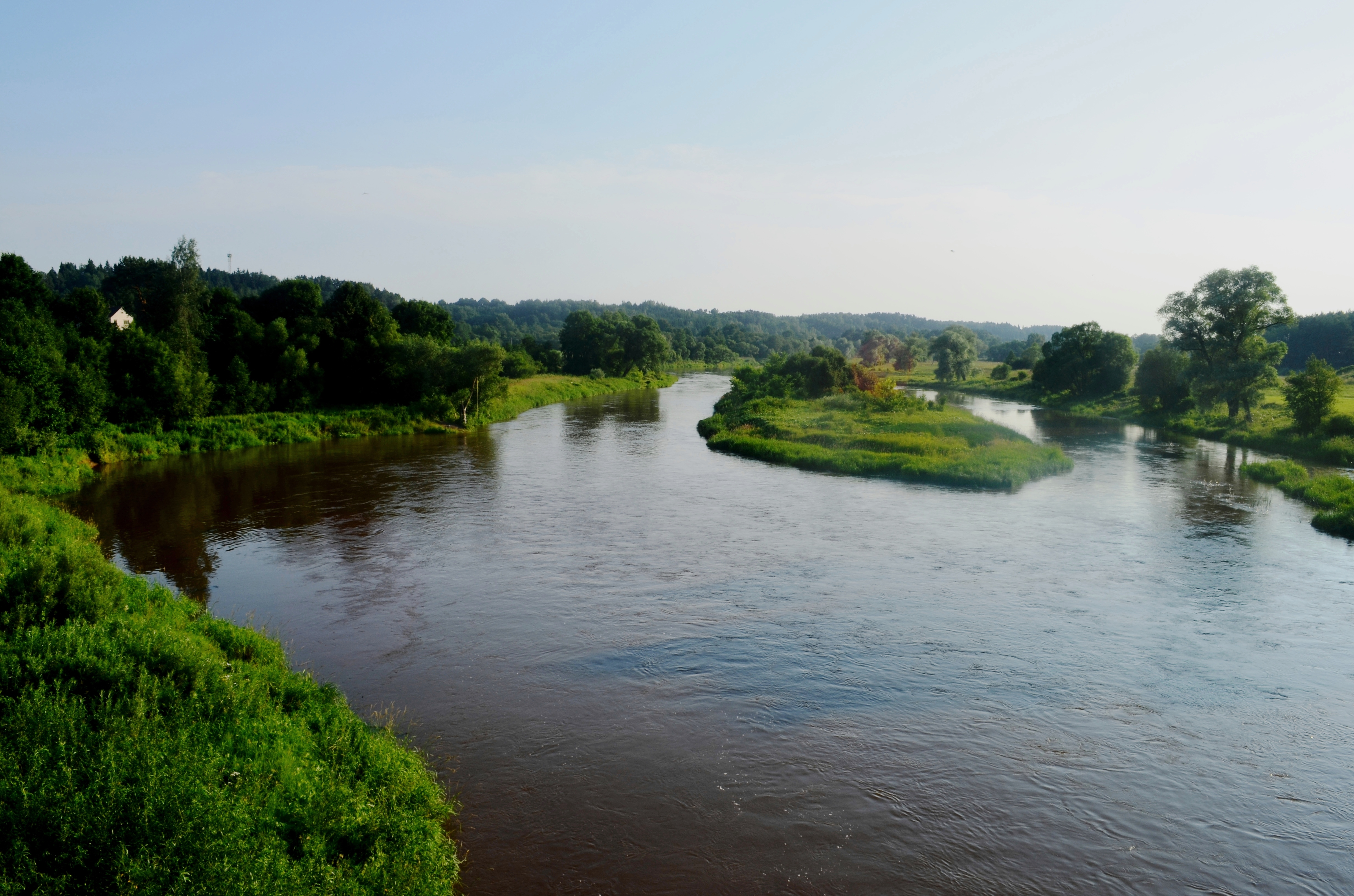 Šventoji ties Upninkais, Jonavos raj.